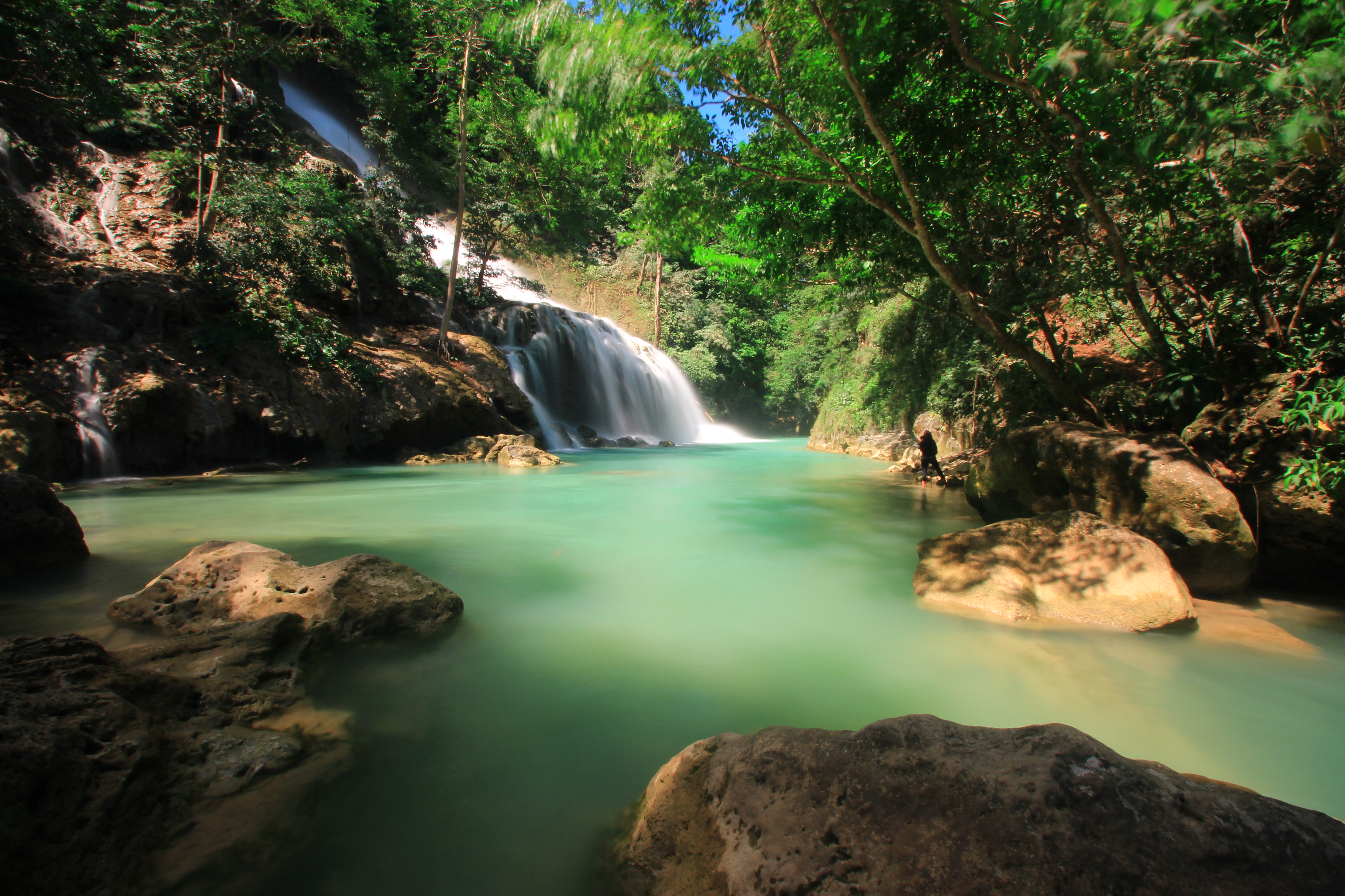 Air Terjun Lapopu terletak di Sumba Barat, Nusa Tenggara Timur, Indonesia. Air terjun bertingkat ini mempunyai tinggi 90 meter.